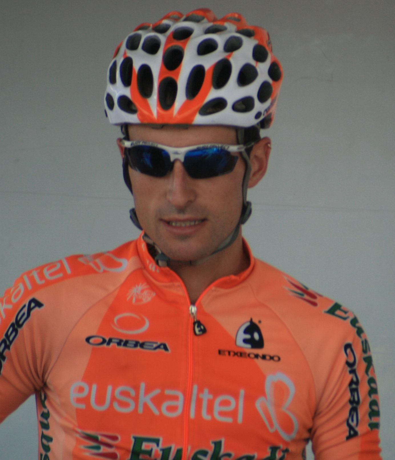 Andoni Lafuente, à l'Eneco Tour 2008, à Ardooie